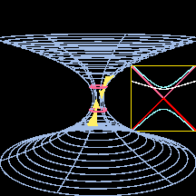 يوصل هذا المعبر بين جانب الكون الموجب وجانبه السالب ، حيث يتبادلان المادة والطاقة